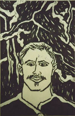 Selbstbildnis 1913